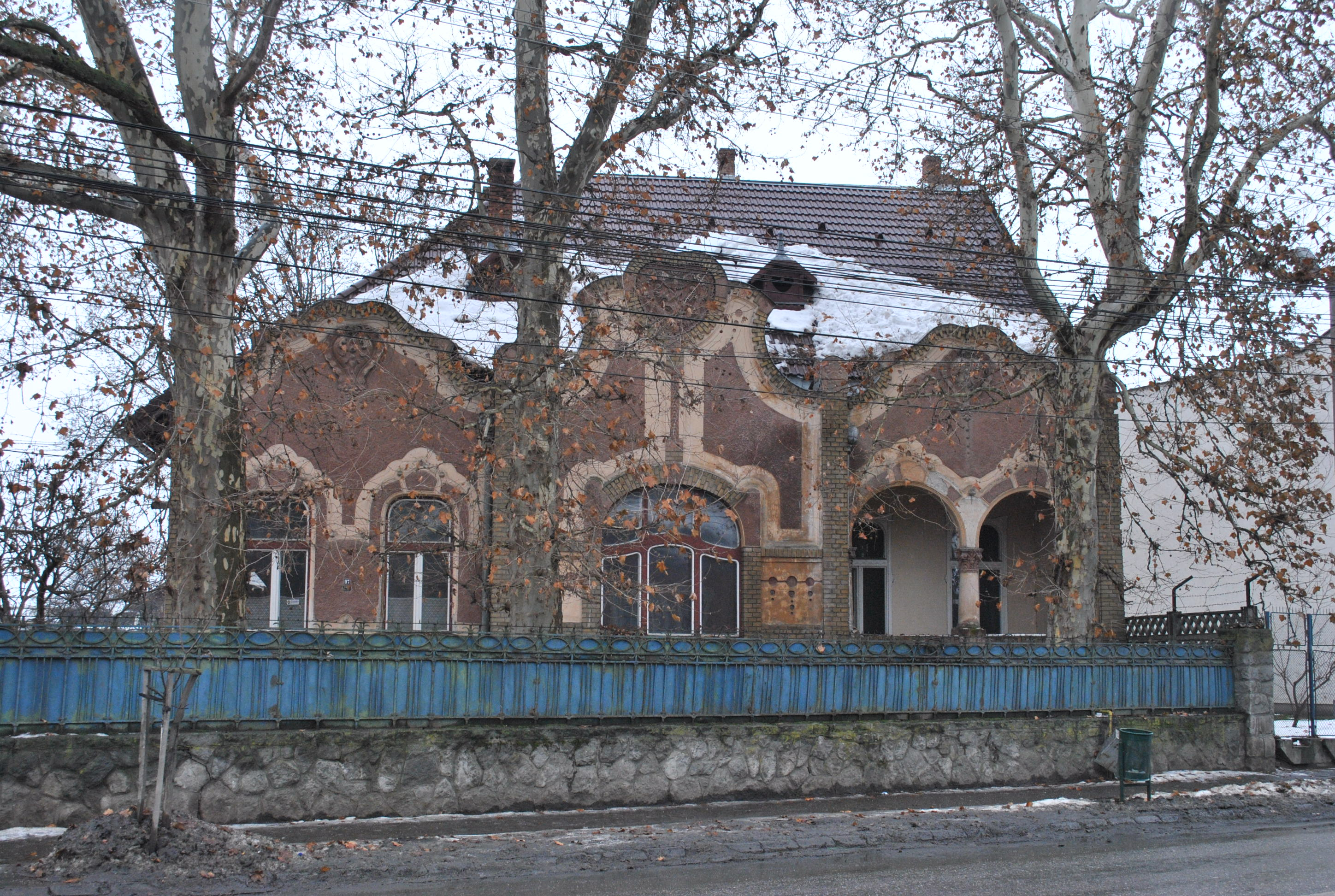 Vila Csiszàr-Vàradi, azi birouri